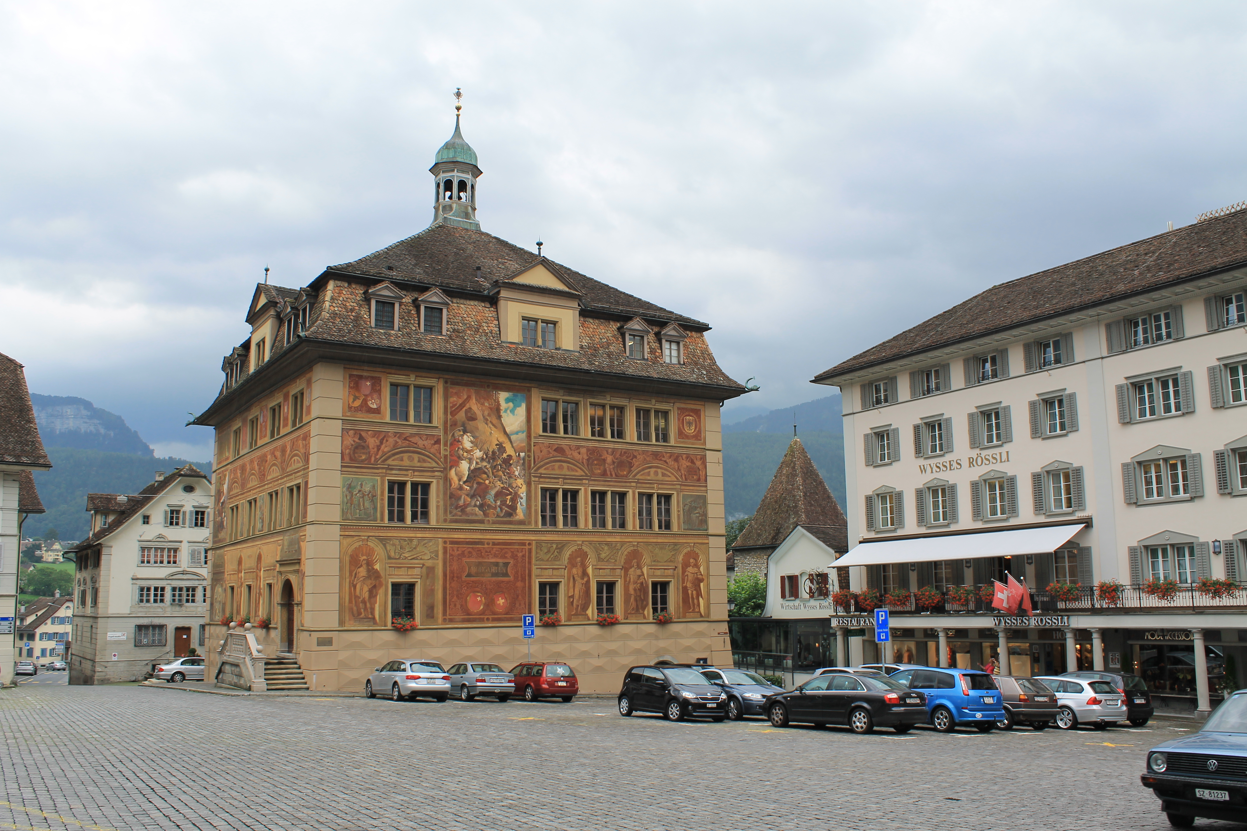 Schwyz